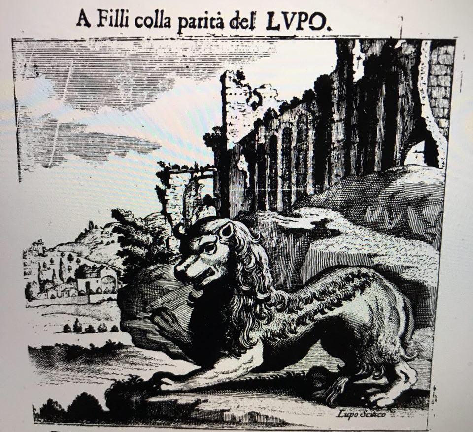 Логическая модель волка. Иллюстрация из трактата "Opera: divisa in cinque libri ne'quali si tratta delle regole di Cavalcare, della professione di Spada, ed altri Esercici d'Armi... : con un Trattato del modo di curare l'infermità de'cavalli... : parimente con l'aggiunta d'alcune Rime, lettere e trattati di fisonomia, pittura, &c ; data in luce da Ettorre D'Alessandro..." Giuseppe D'Alessandro Antonio Muzio